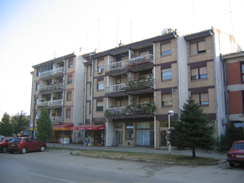 Blocuri de locuinte in Alibunar, Banatul Sarbesc